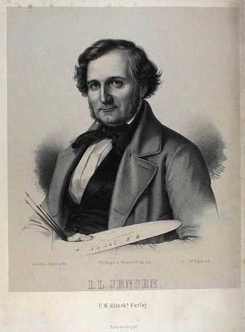 Johan Laurentz Jensen (J.L. Jensen) (1800-1856), Danish painter